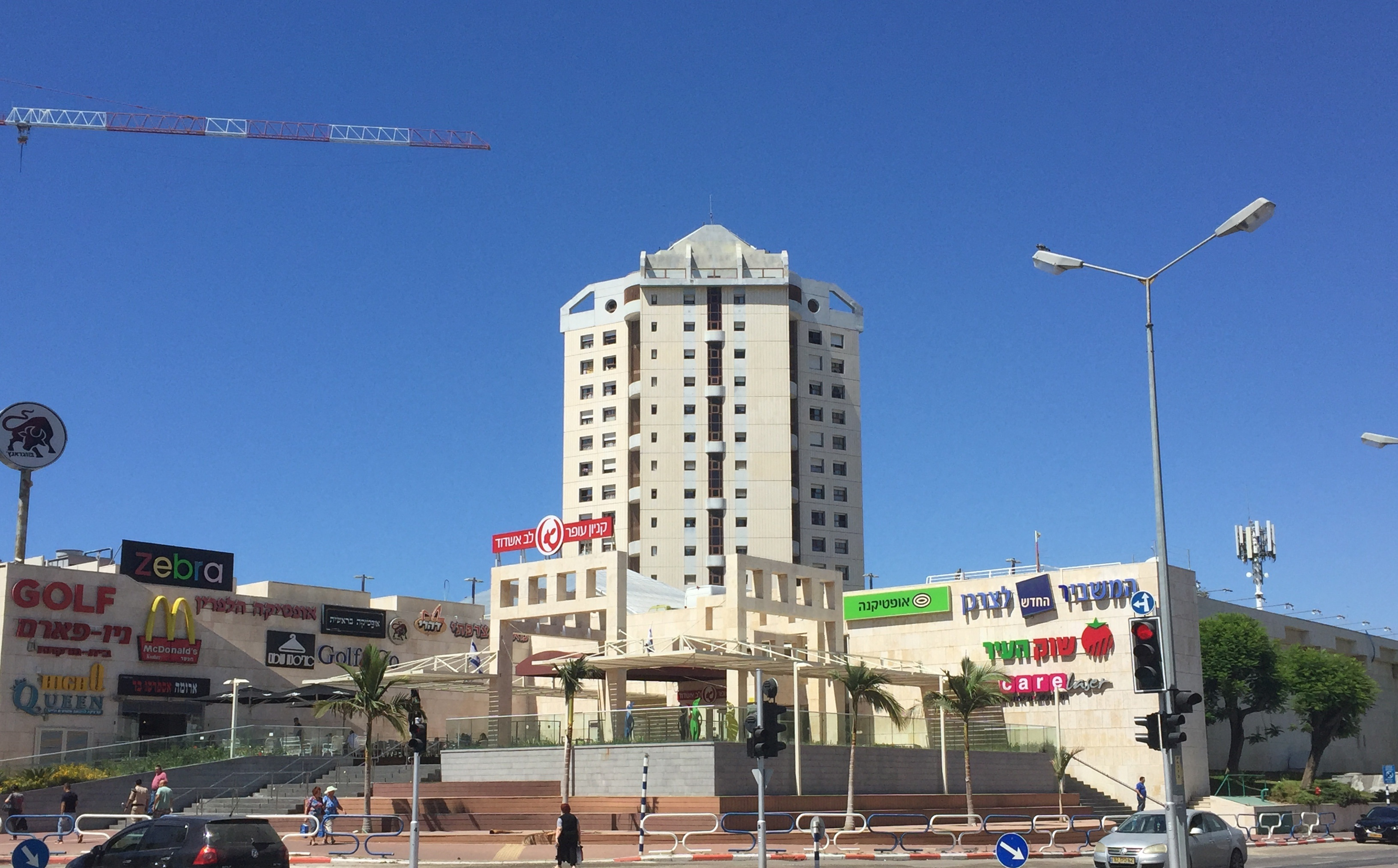 קניון לב אשדוד ברובע ה'.